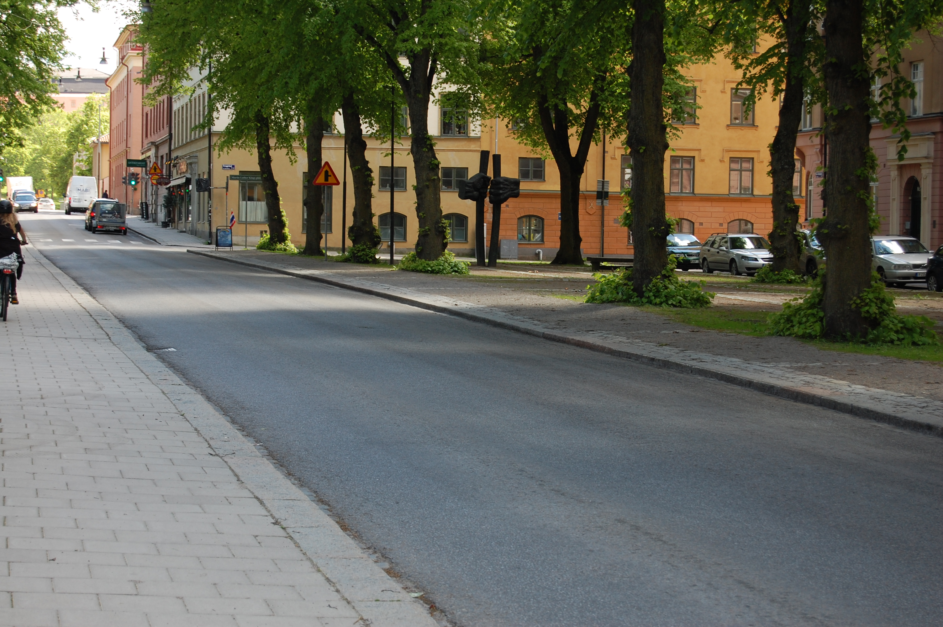 Övre slottsgatan i Uppsala bakom Universitetshuset, nära korsningen St Olofsgatan. Längre bort syns Martin Luther Kings plats.